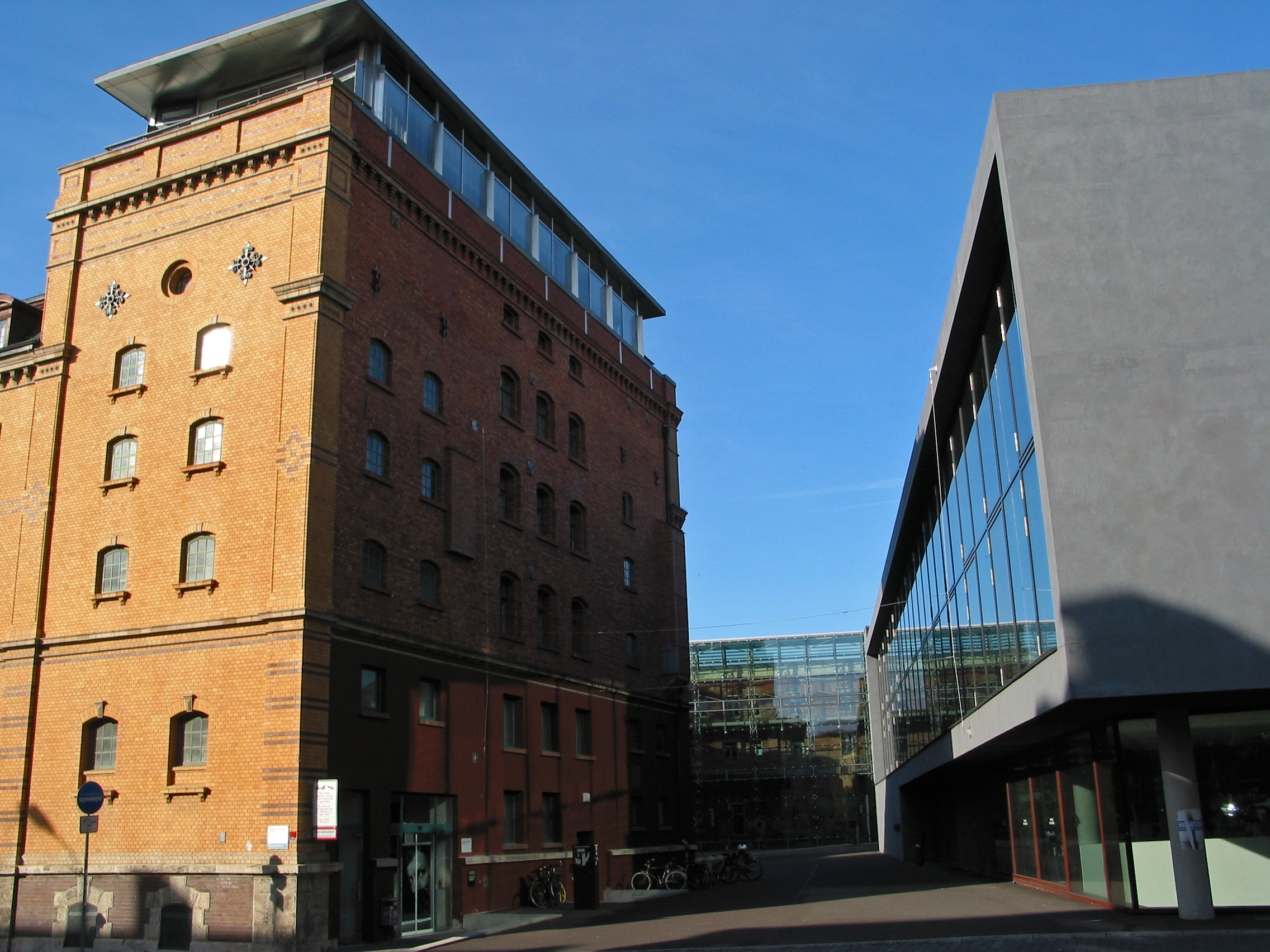 Das sogenannte Hochschulforum in Weimar, ein Platz, der sich zwischen Limona-Gebäude (links), dem Neubau der Universitätsbibliothek (rechts) und dem Zuse-Medienzentrum (Glasbau im Hintergrund) auftut.